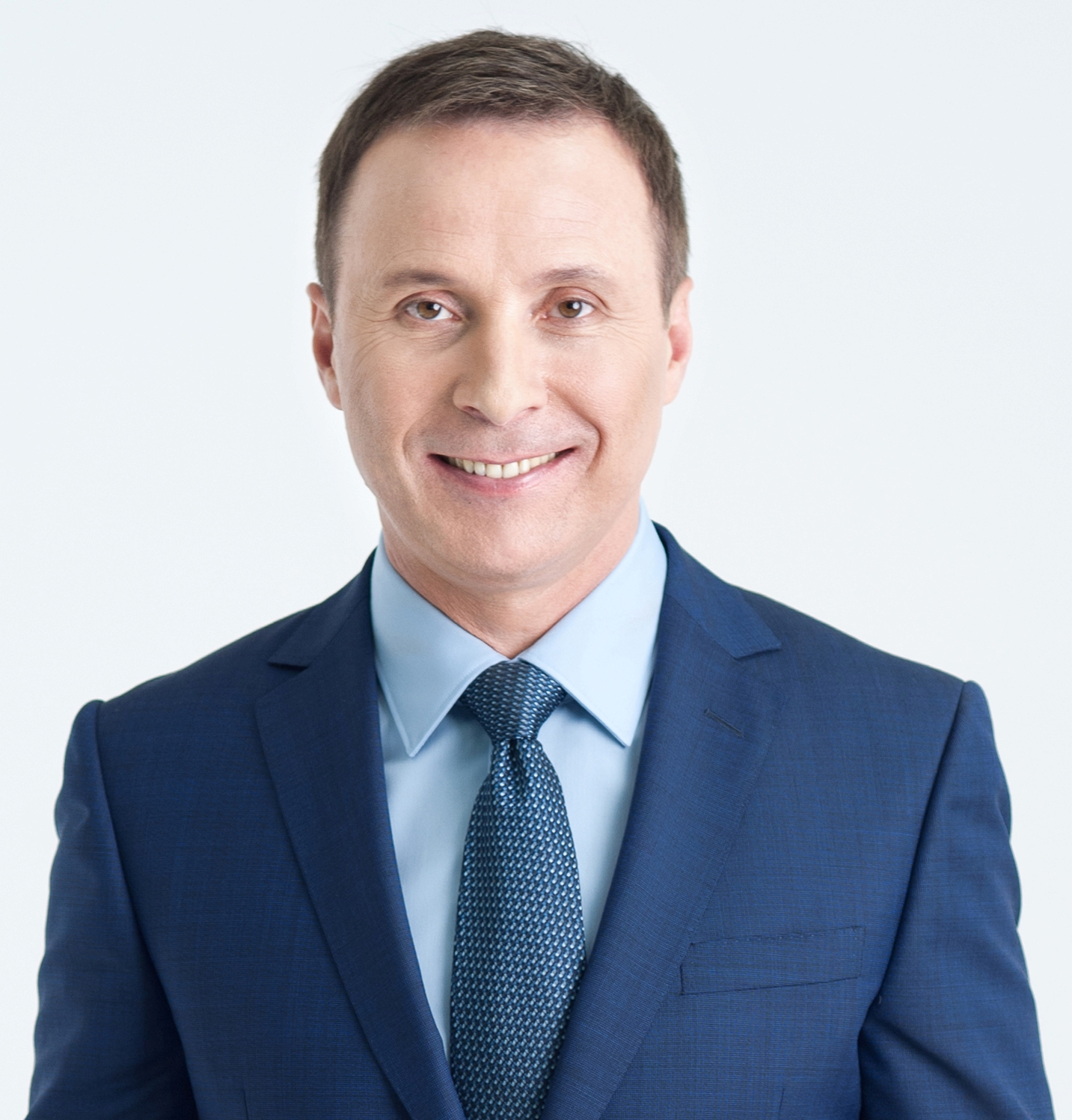 Мер Полтави (2006-2010)